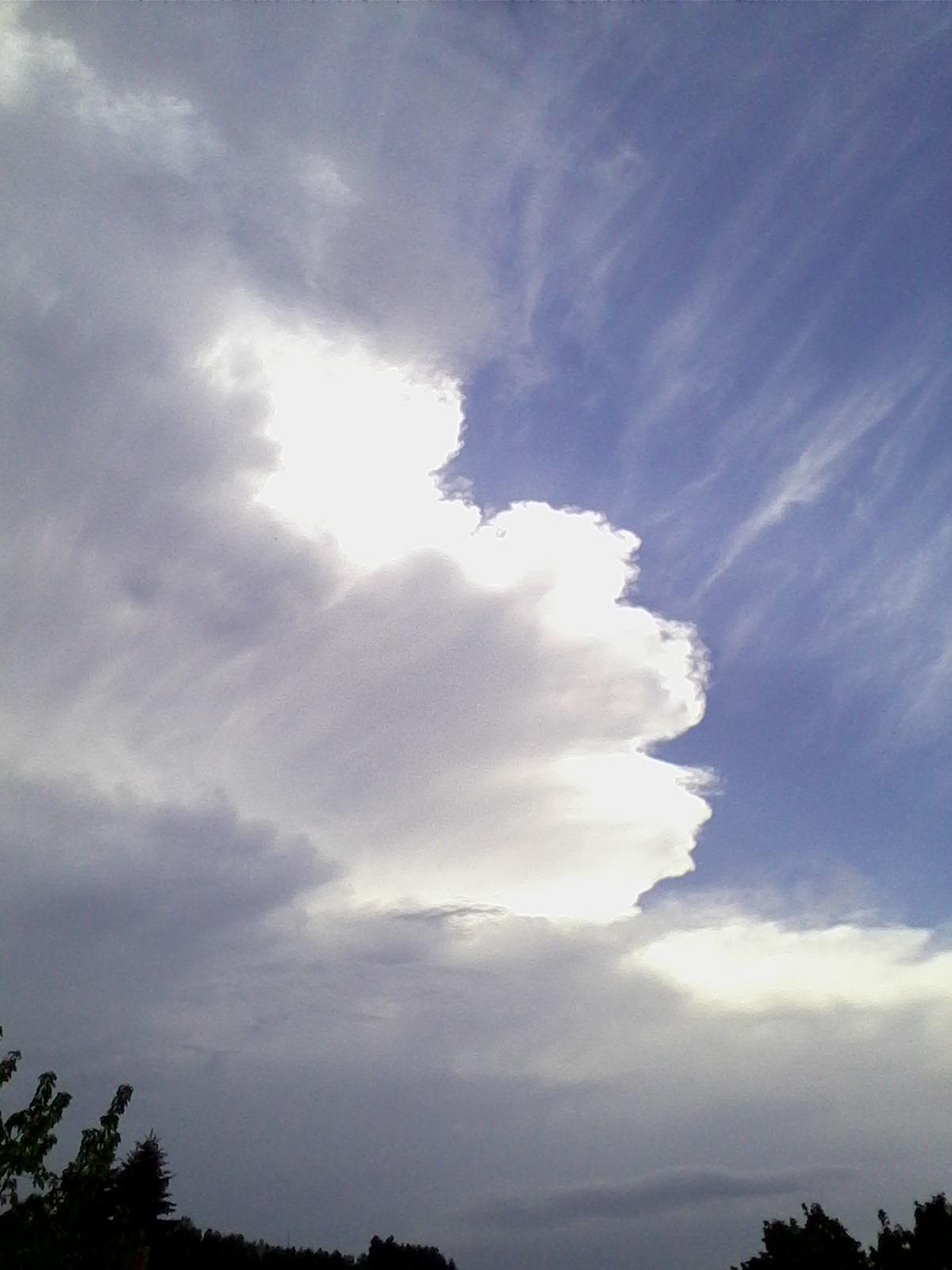 Velmi silná bouřka, v jejím středu napršelo až 100 mm srážek za hodinu.